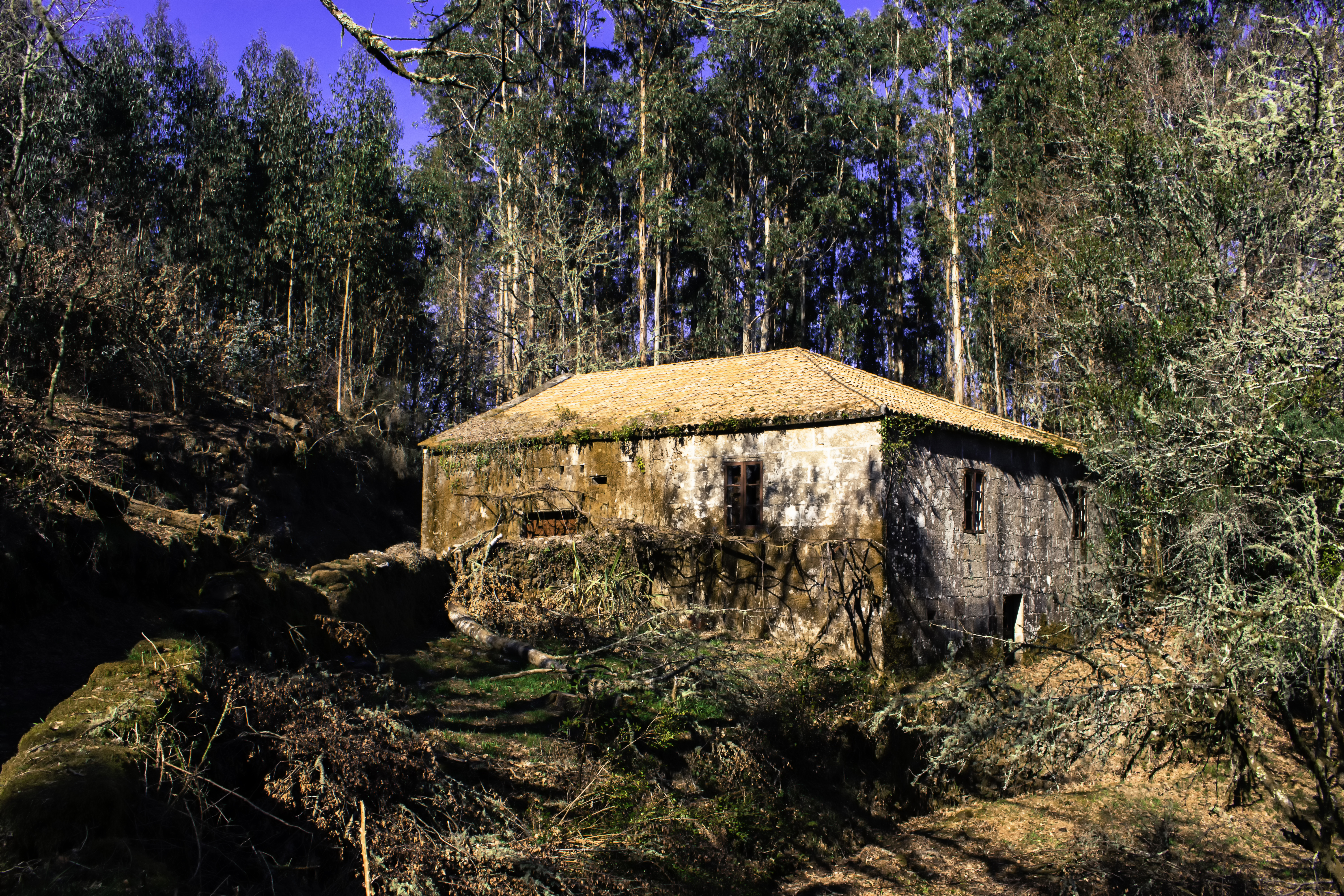 Casa abandonada en Arufe, Cerdedo-Cotobade.